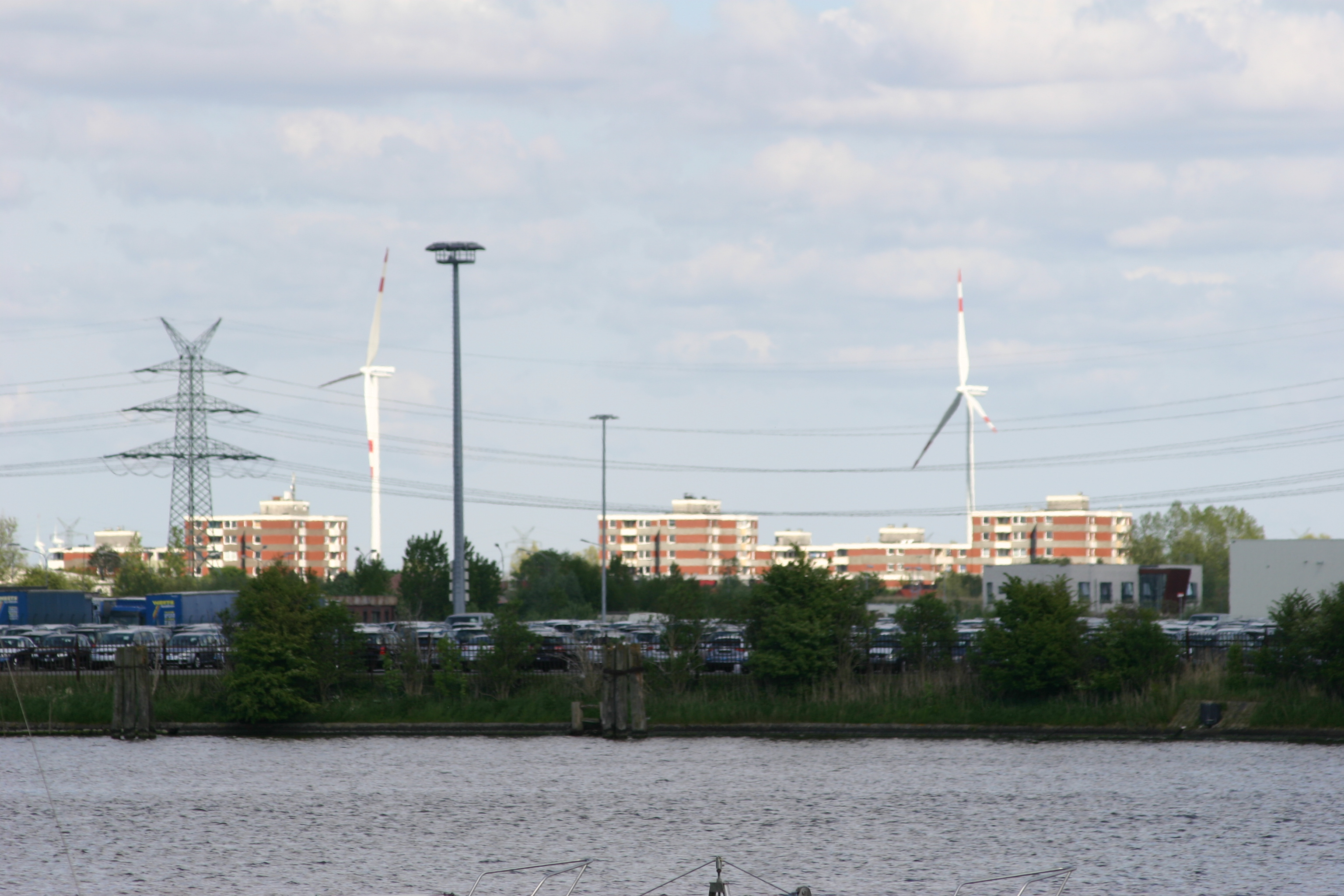 Blick auf Hochhäuser im Stadtteil Borssum und einen Teil des Hafens in Emden, Ostfriesland, Niedersachsen